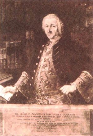 Grabado de Agustín Montiano y Luyando